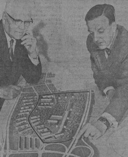 Byggnadsnämnends ordförande David Johannson och stadsplanearkitekt Bertil Tideström med modell för bostadsområdert Klockartorpet i Västerås